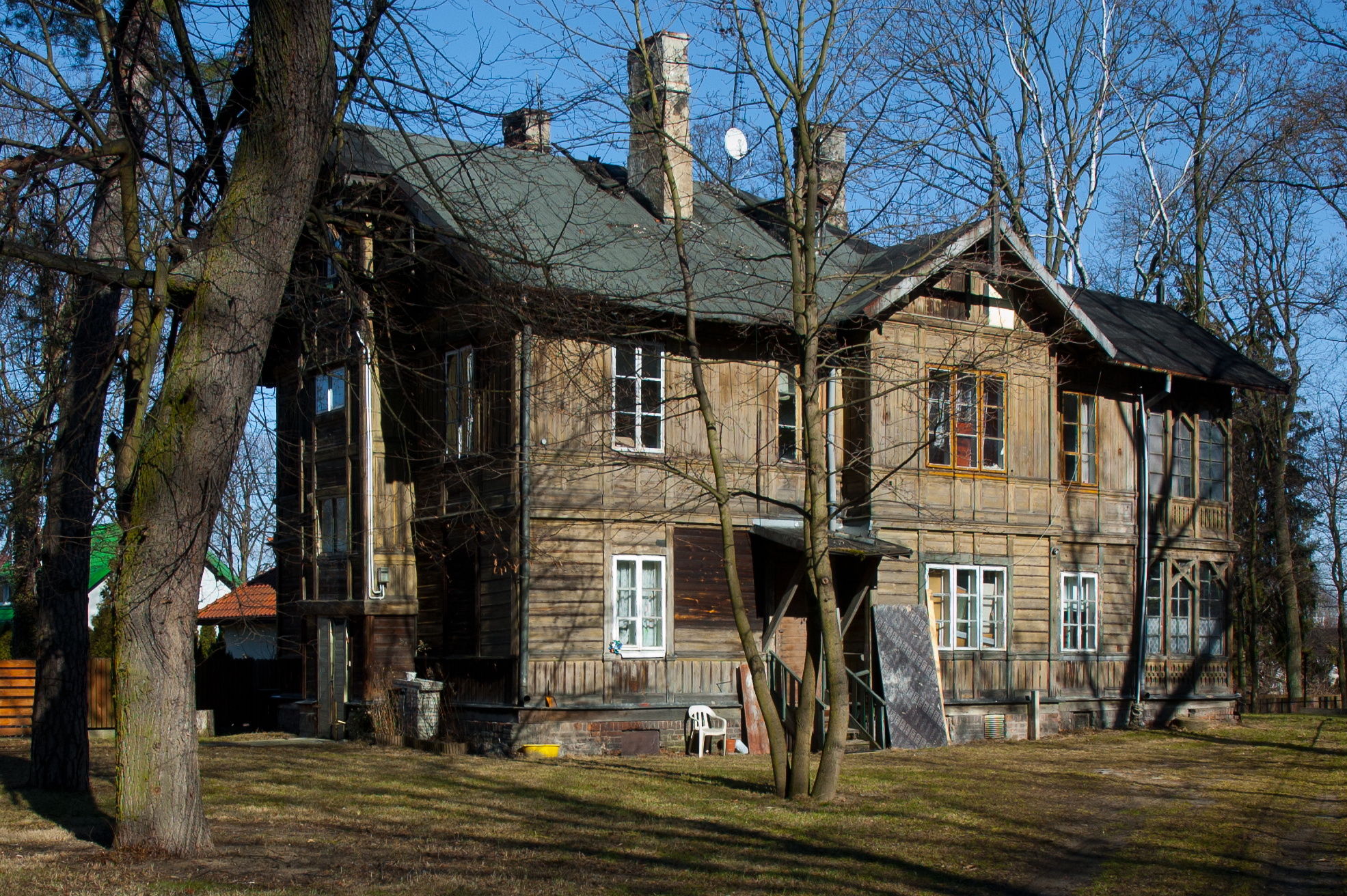 Warszawa ul. Fletniowa 2 - willa letniskowa w stylu nadświdrzańskim (zabytek, nr rejestr. A-898 z 22.01.20)